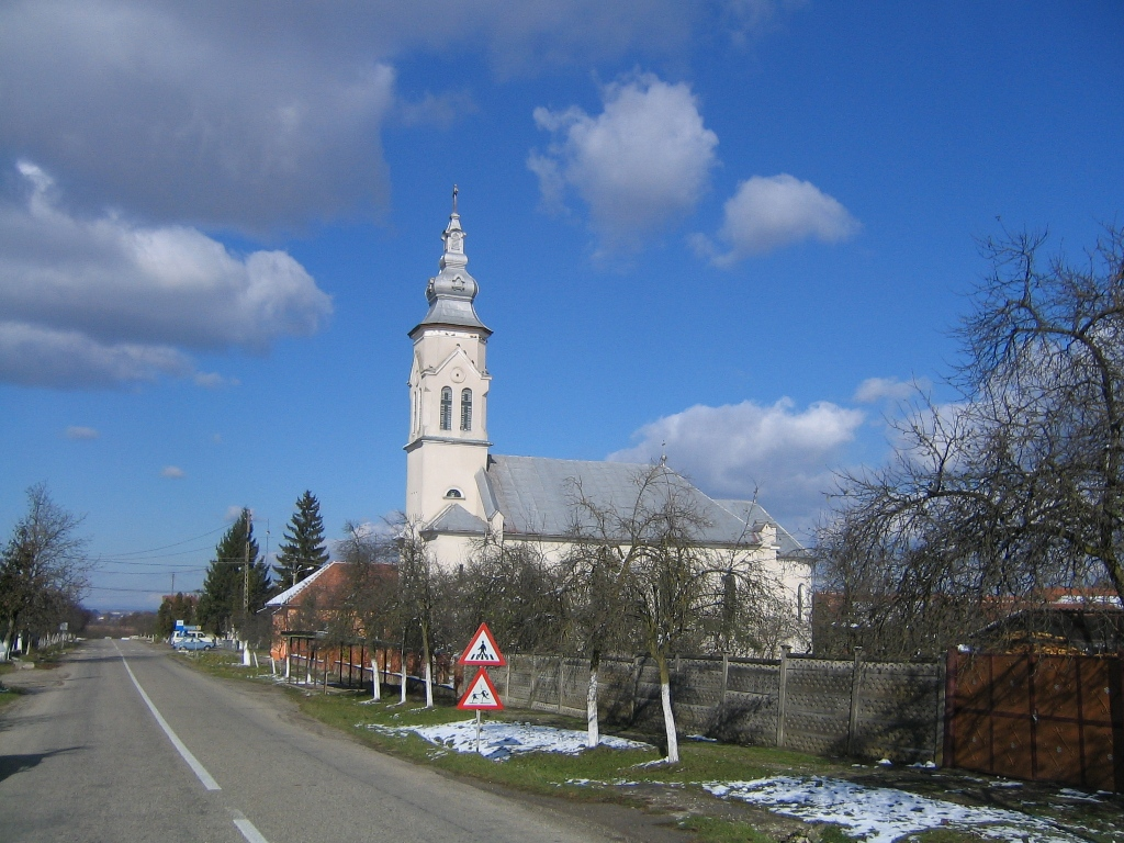 Vedere cu satul Victor Vlad Delamarina, Timiş Categorie:Imagini din Banat